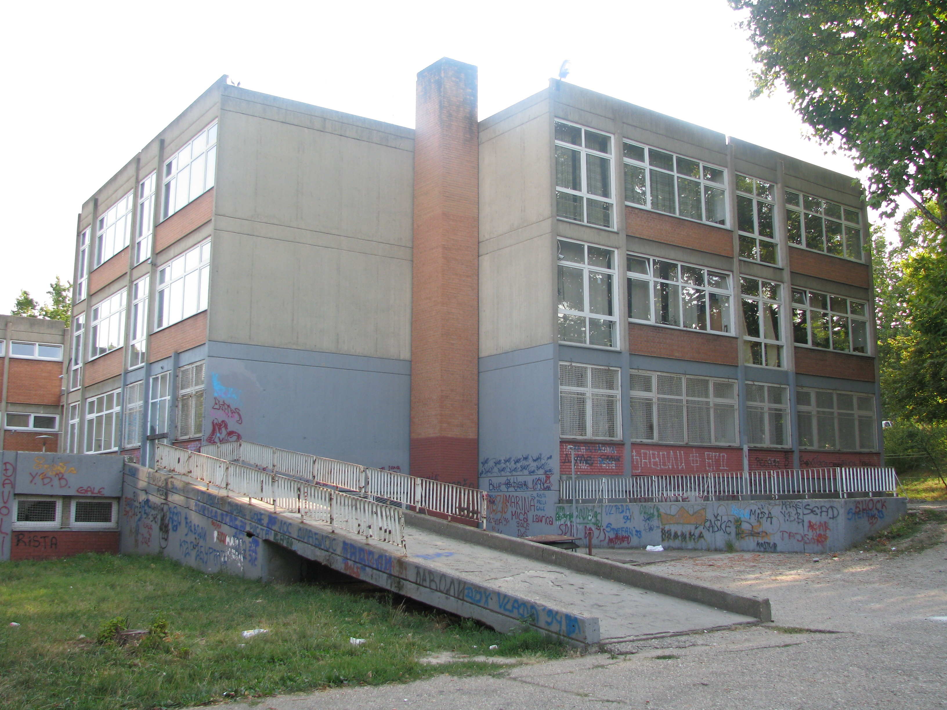 ОШ Филип Вишњић (Карабурма) Licensing